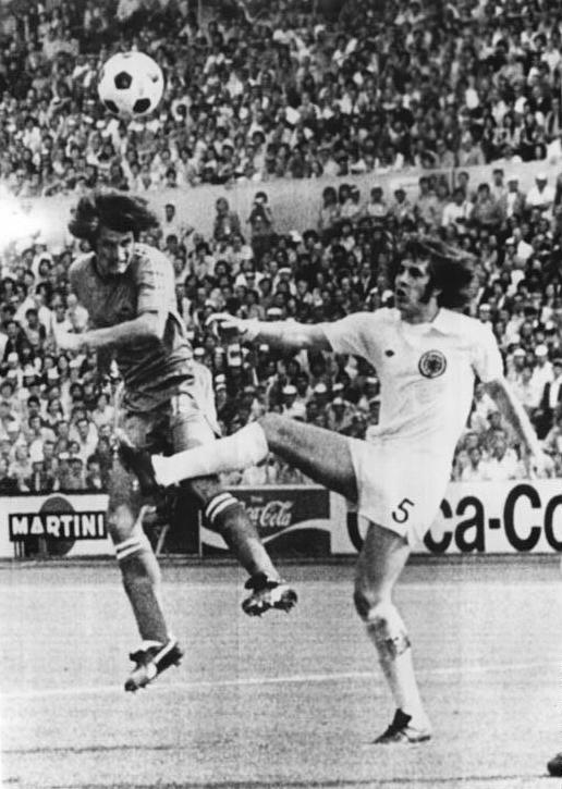 ADN-ZB-AP-Tele-22.6.74-ma-BRD-Frankfurt-Main: X. Fußball-Weltmeisterschaft-1. Finalrunde, Gruppe 2: Schottland - Jugoslawien 1:1- Dusan Bajevic (Jugoslawien-links) beim Kopfball auf das schottische Tor. Rechts verfehlt James Holton (Schottland) den Ball.